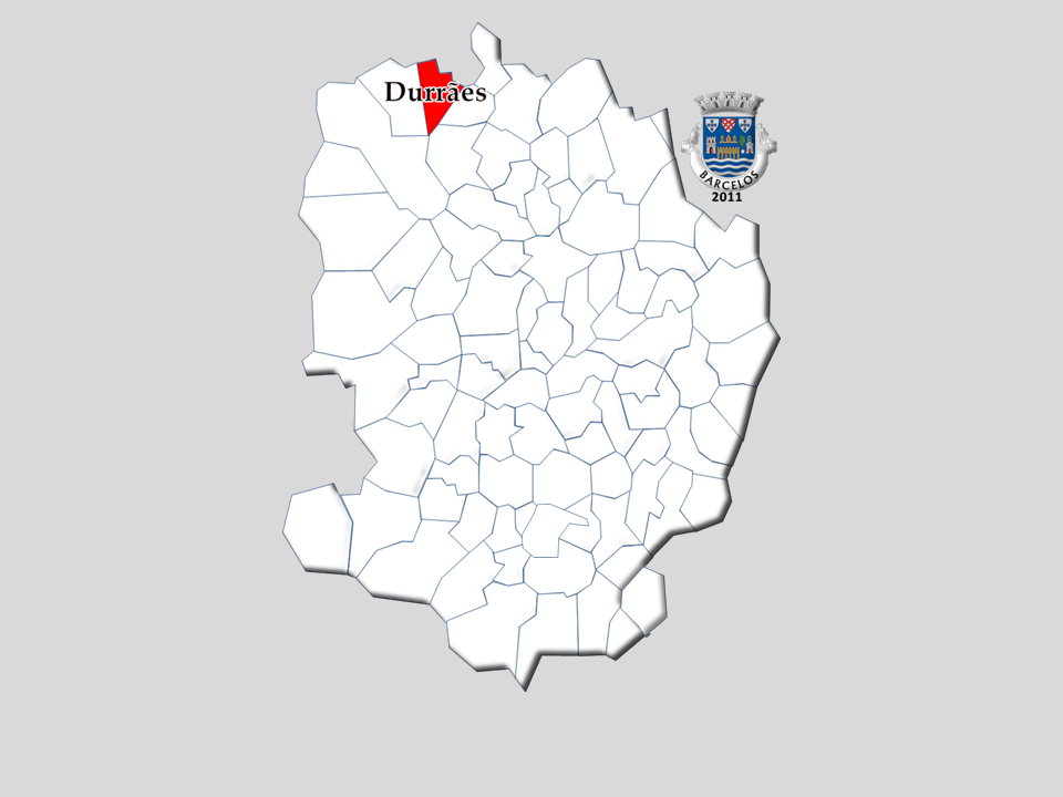 anos1864/2011